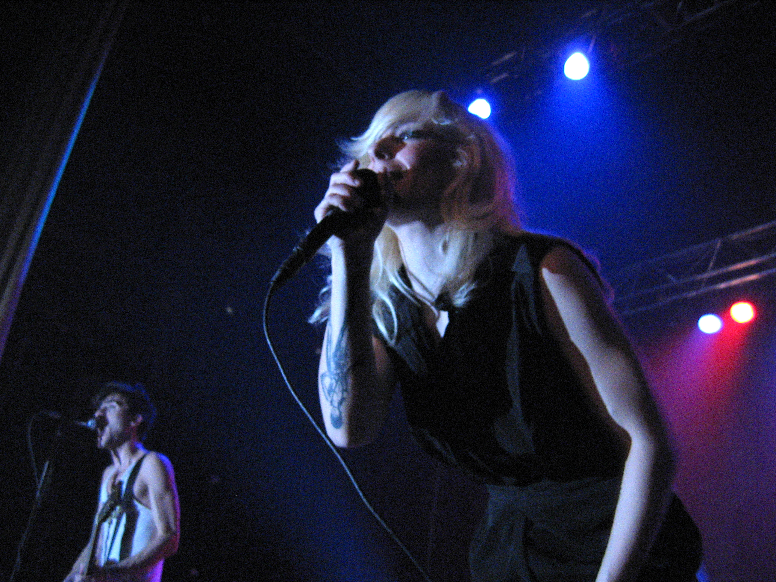 April 2006, Le National, Montréal